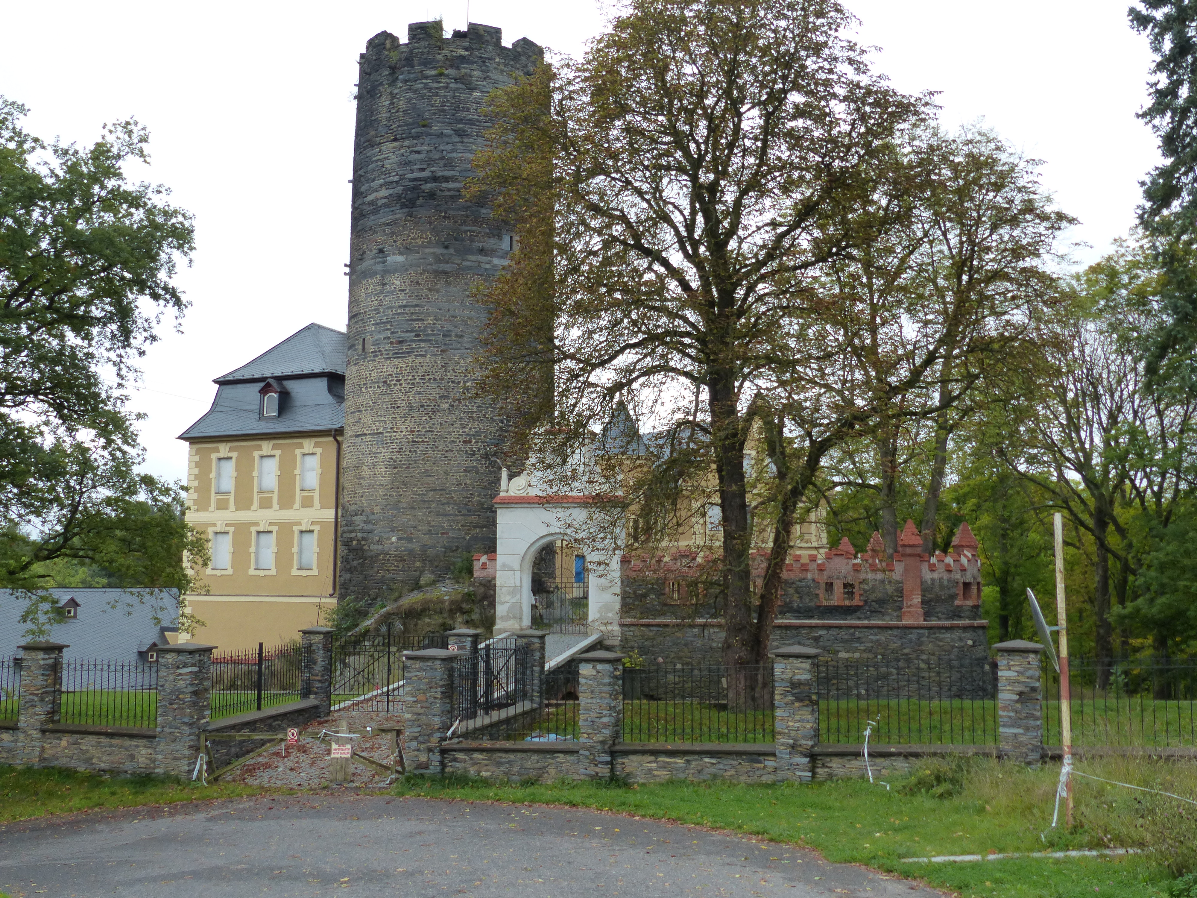 Ansicht von Schloss Starý Hrozňatov